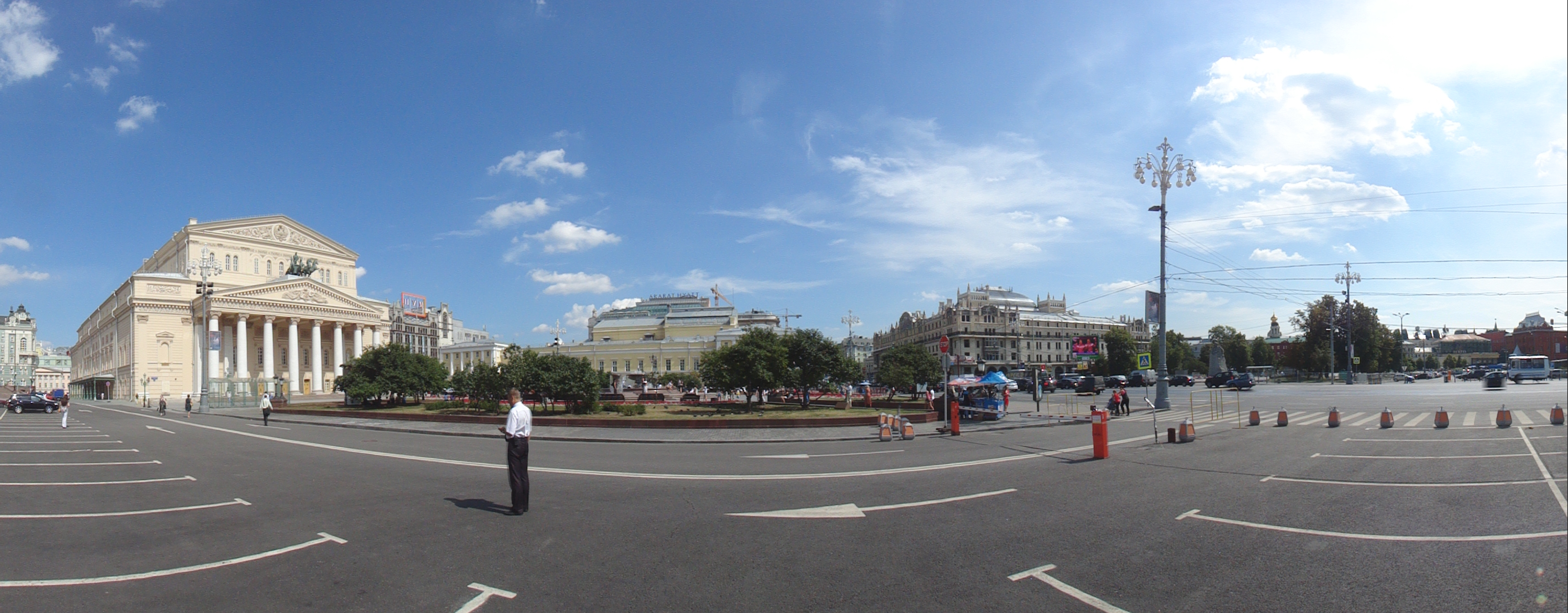 Театральная площадь знойным летом .